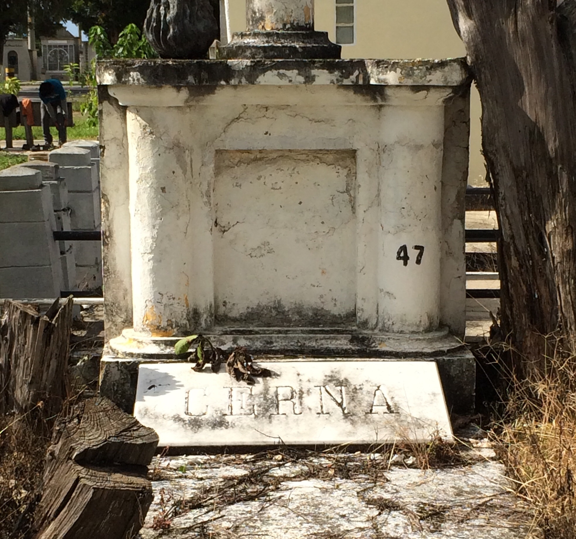 Tumbacerna